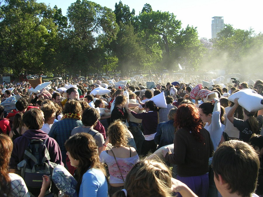 Guerra de almohadas masiva en Buenos Aires